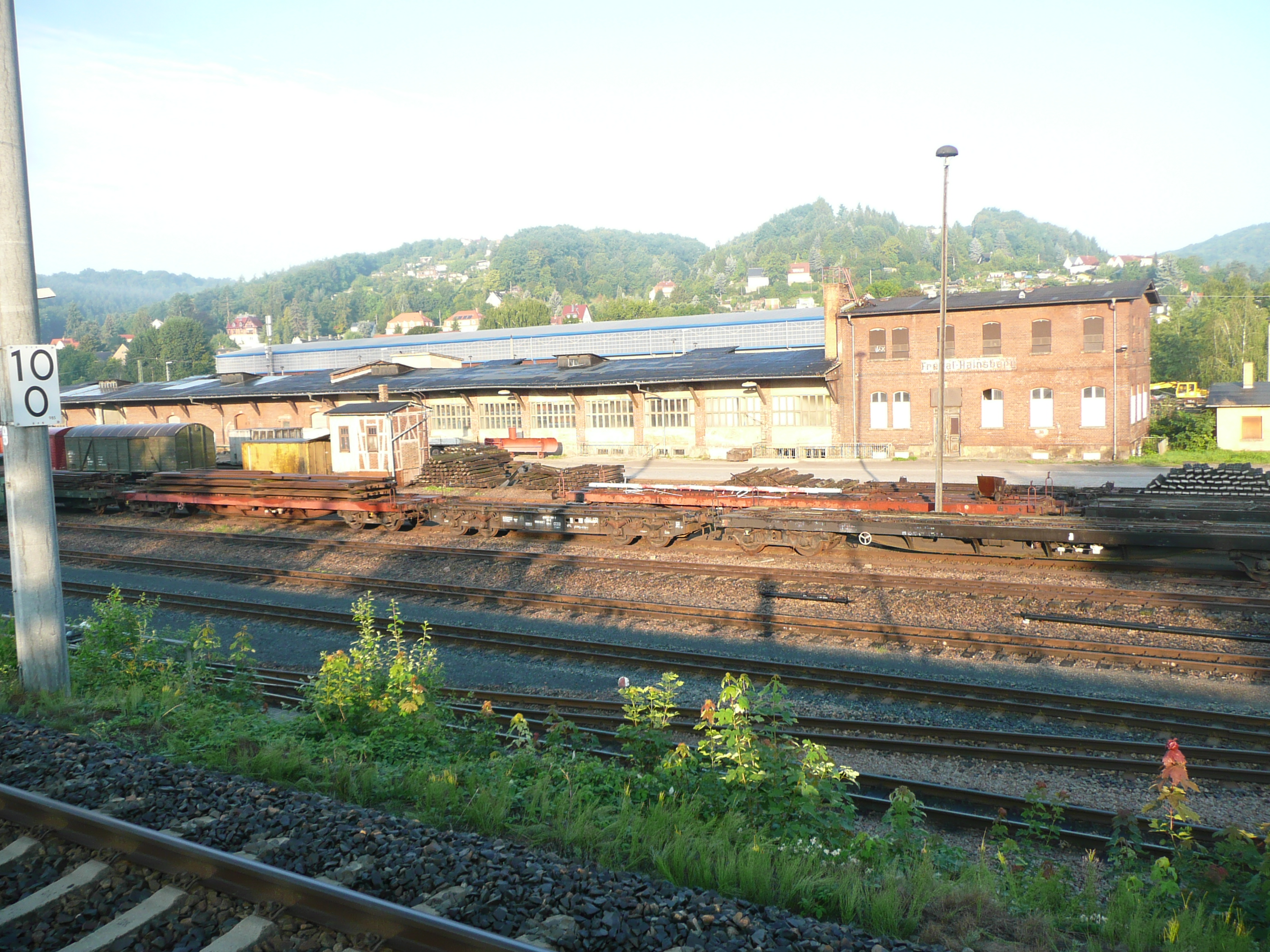 Blick auf den Güterschuppen in Bahnhof Freital-Hainsberg